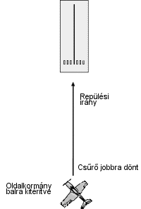 A csúsztatás nevű repülési helyzetet illusztráló ábra. A repülőgép oldalkormánya balra, csűrője jobbra tér ki, aminek hatására a repülőgép oldalazva halad a leszállópálya irányába, miközben jelentősen veszít a magasságából.